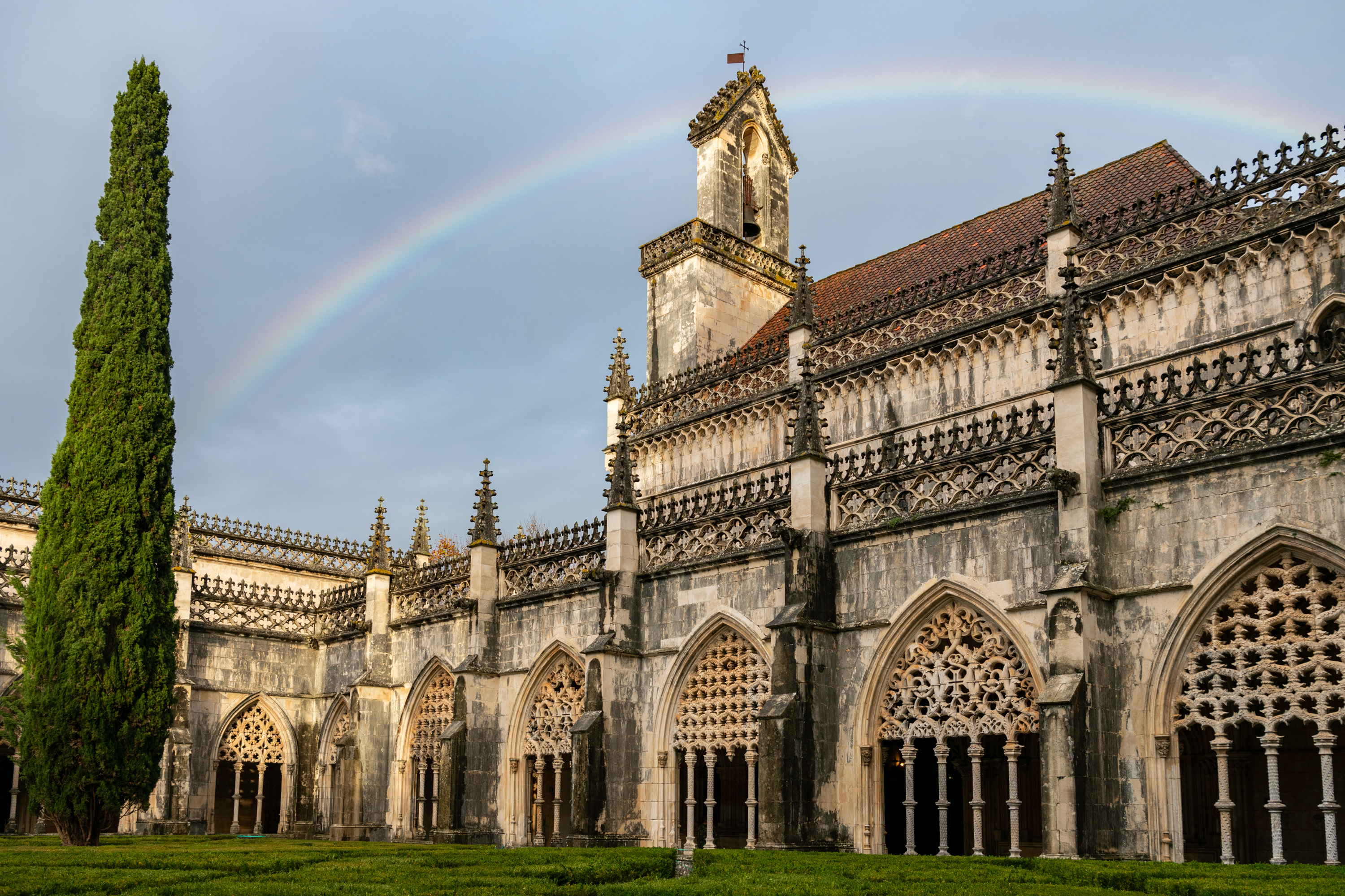 10152-Batalha